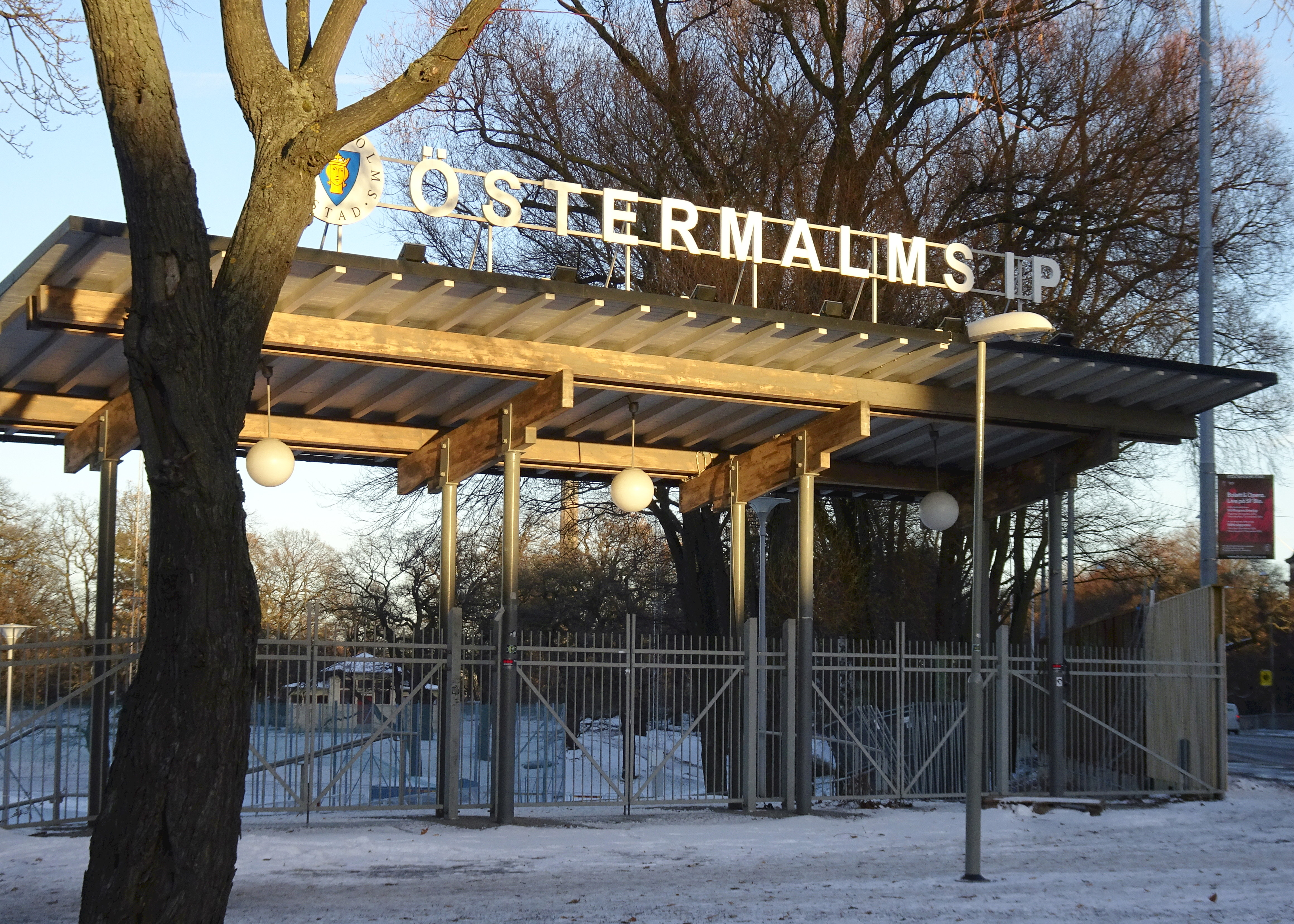 Östermalms IP entré från Lidingövägen